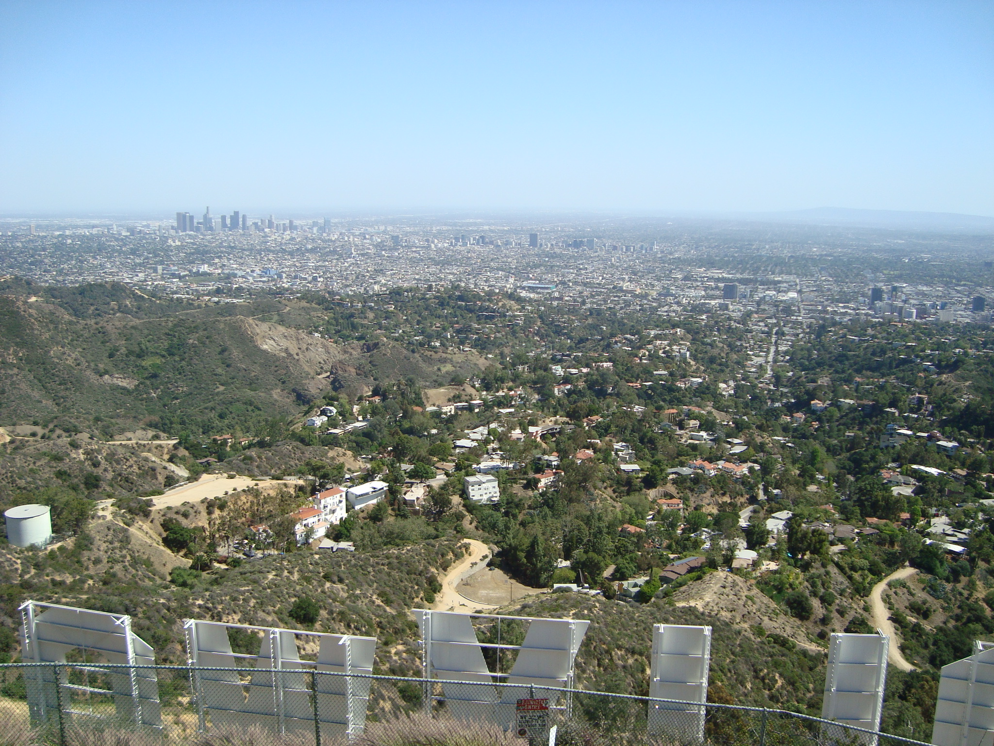 Hollywood